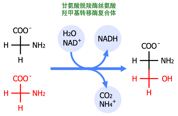 光呼吸中，两分子甘氨酸生成一分子丝氨酸的过程